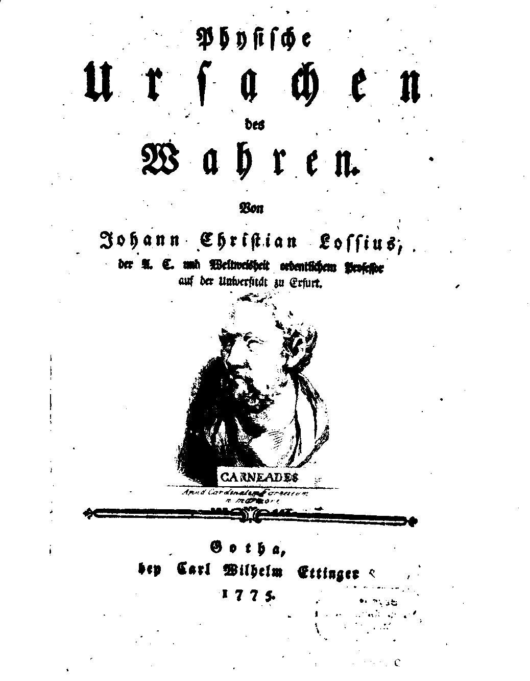 Es ist der Titel von "Physische Ursachen des Wahren" von Johann Christian Lossius. Erschienen 1775 in Gotha.